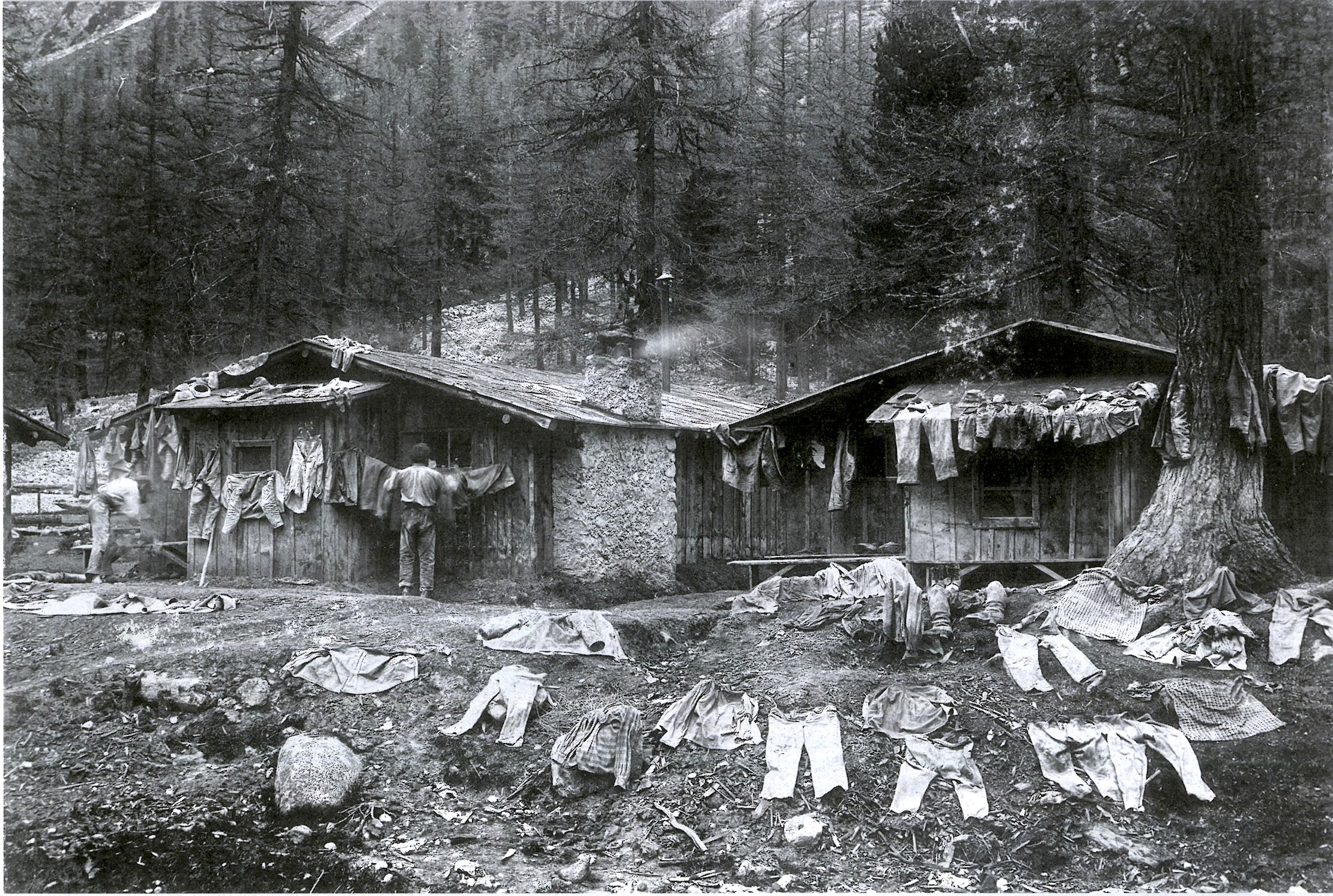 Arbeitersiedlung beim Bau des Albulatunnel